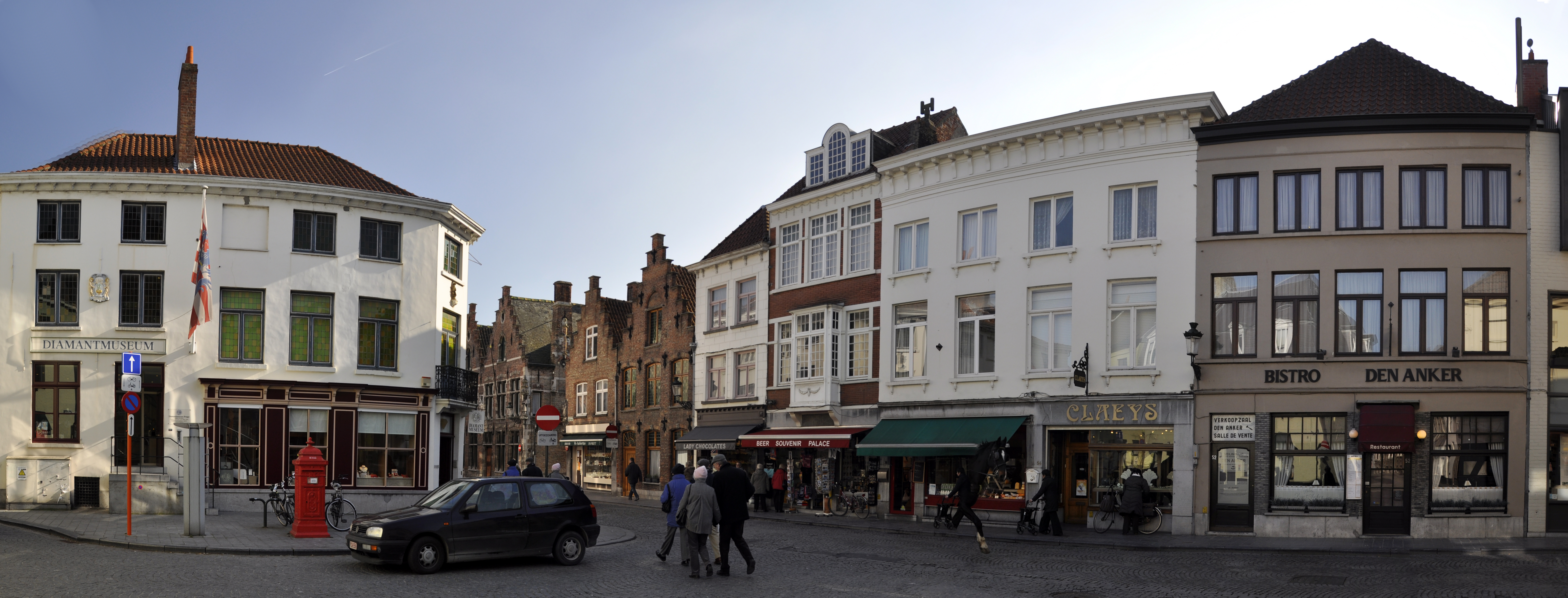 Panorama in Brugge, gemaakt met photoshop (photomerge) waarbij ongewenste details van de samengevoegde foto's worden getoond (zie kop paard en voorbijgangers die meer dan eens worden getoond); Brugge